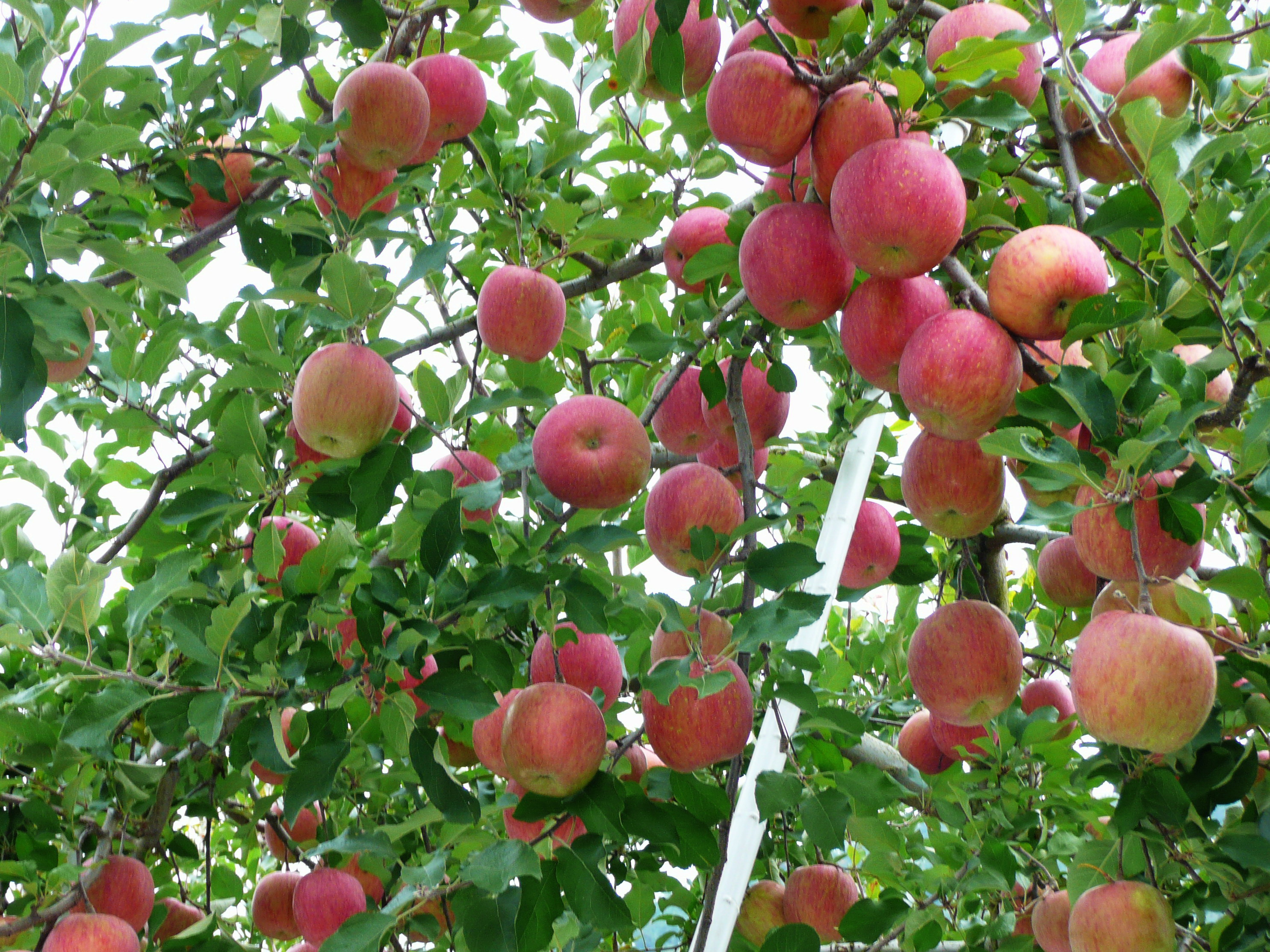 蘋果 Apples